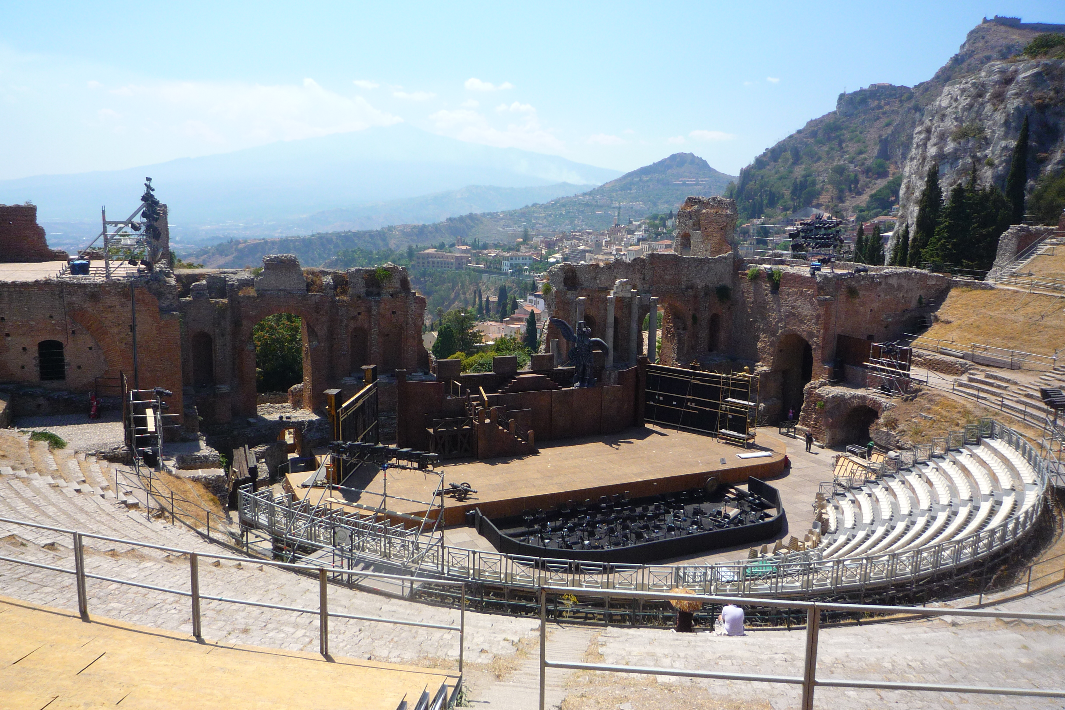 Teatro antico di Taormina